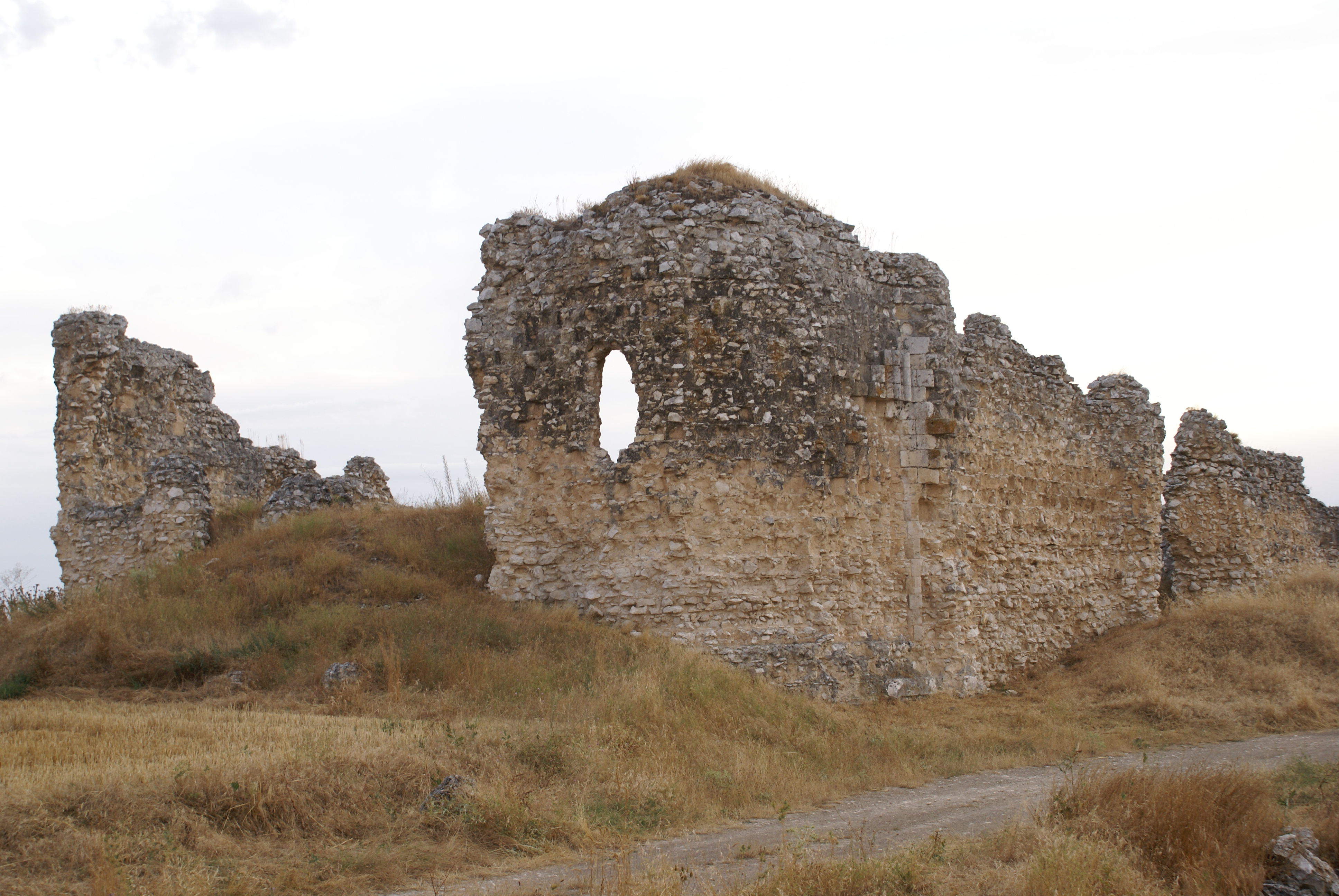 Ruinas del Convento de Oreja, Langayo, Valladolid.